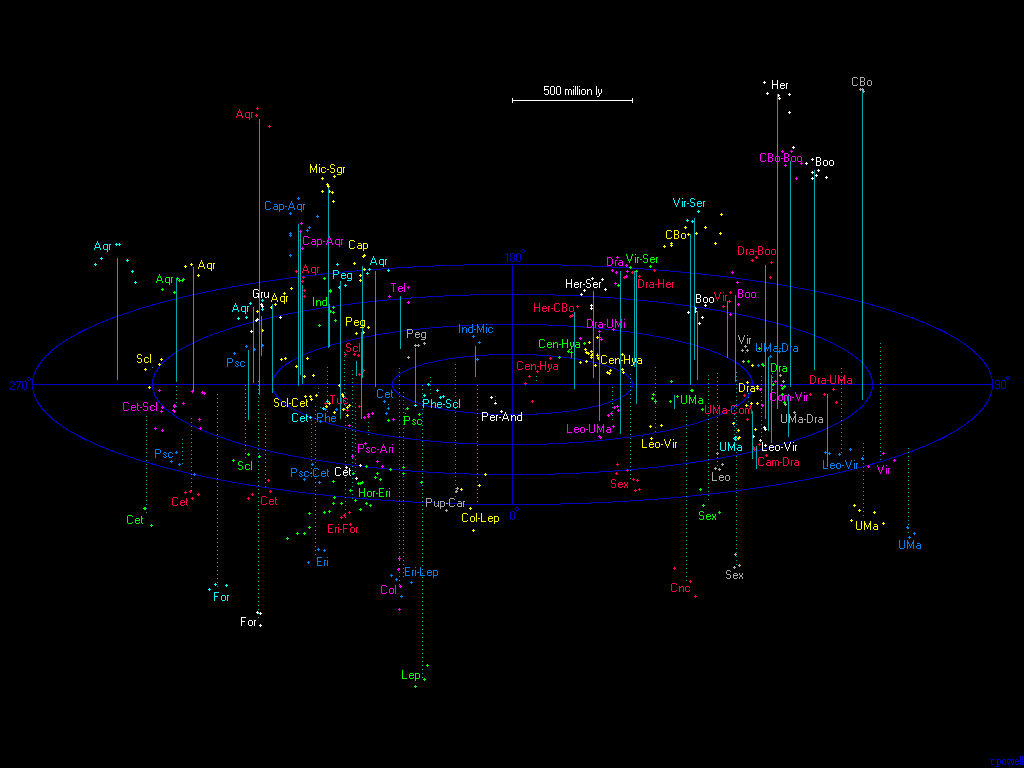 Mappa dell'Universo osservabile entro un raggio di 2 miliardi di anni luce.